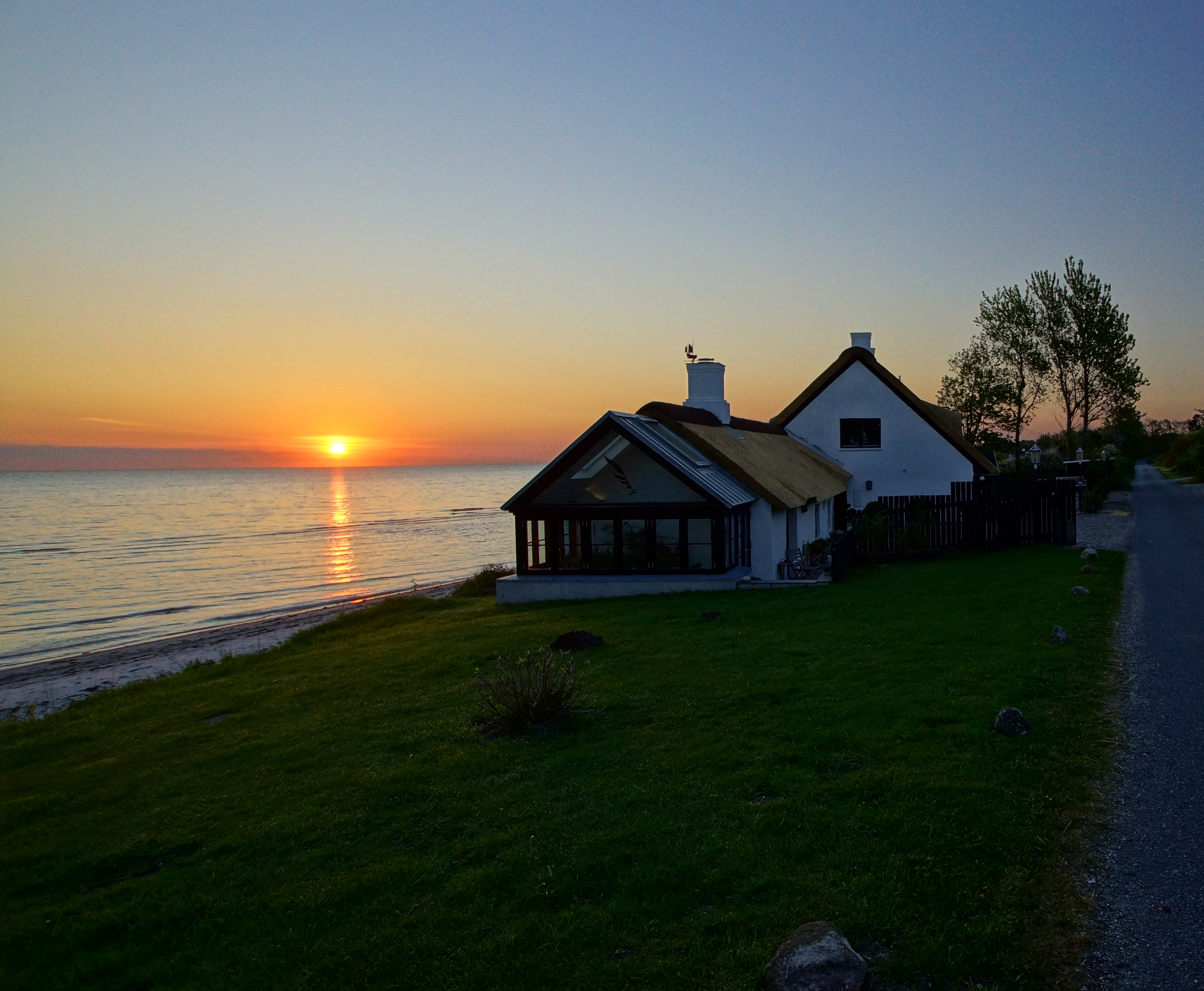 Havhuse, Norddjurs